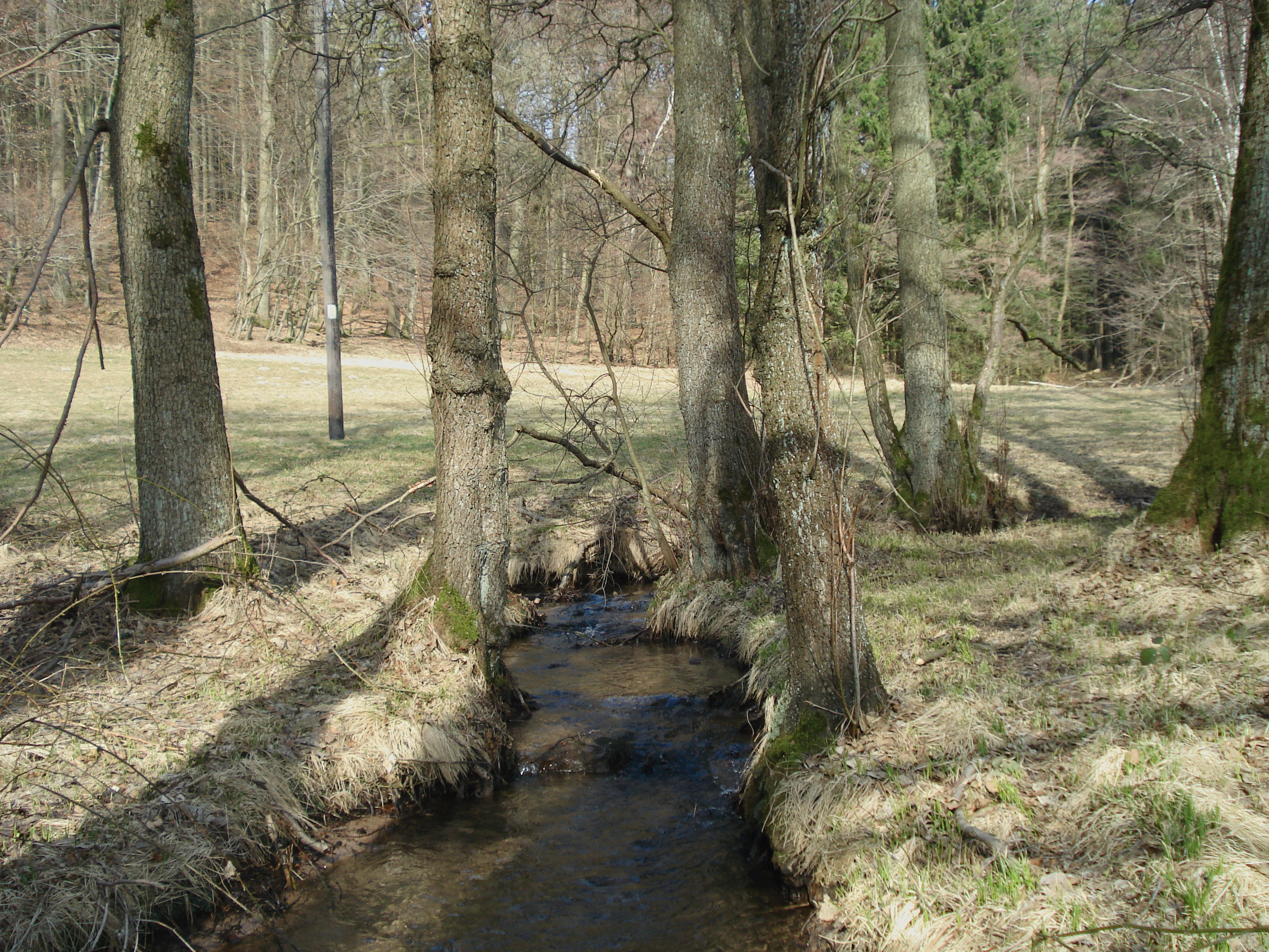 Der Lindenbach an der Glashütte